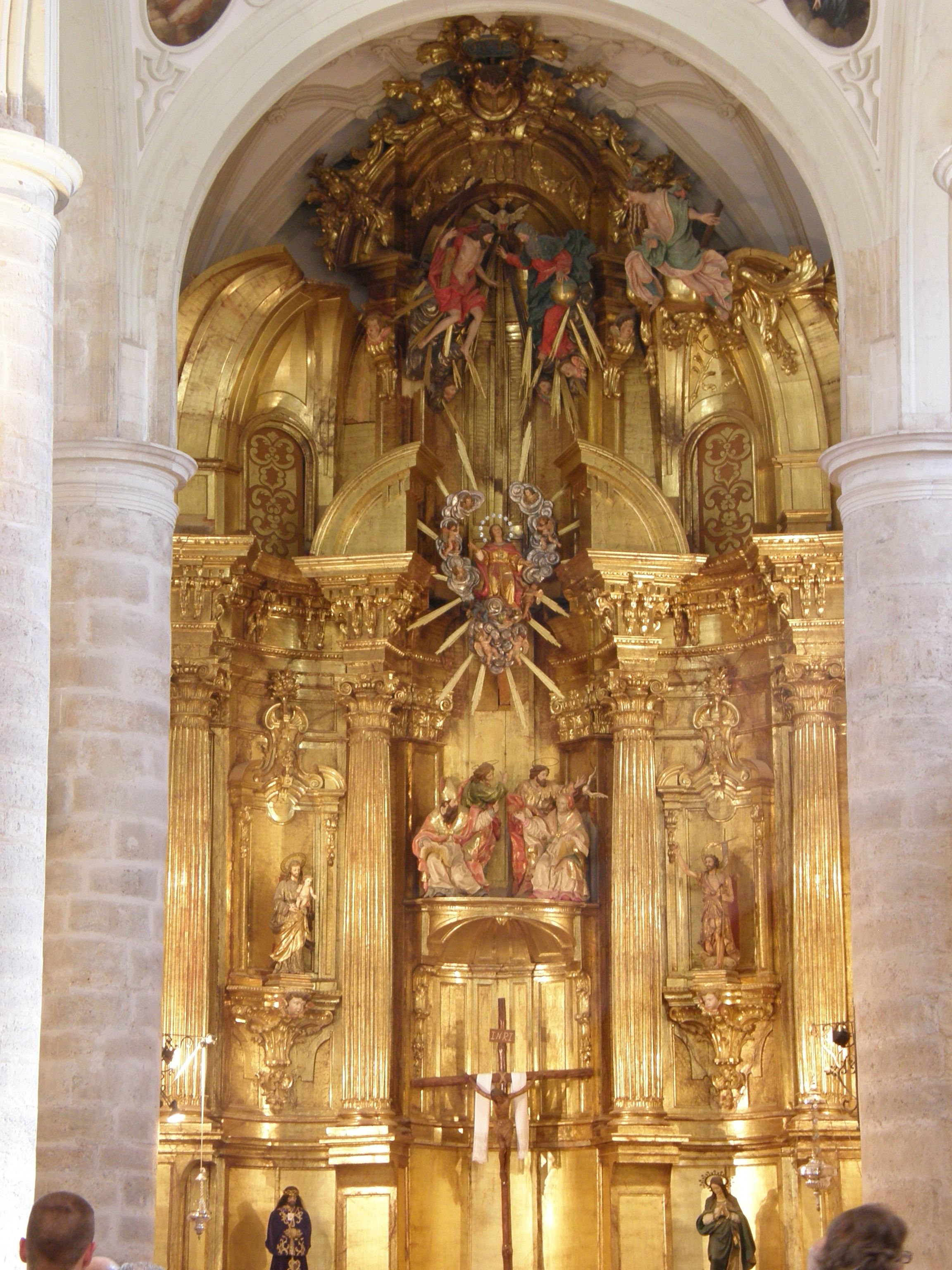 Retablo mayor estilo barroco